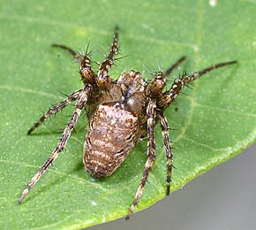 male Eriophora sagana from Okinawa.